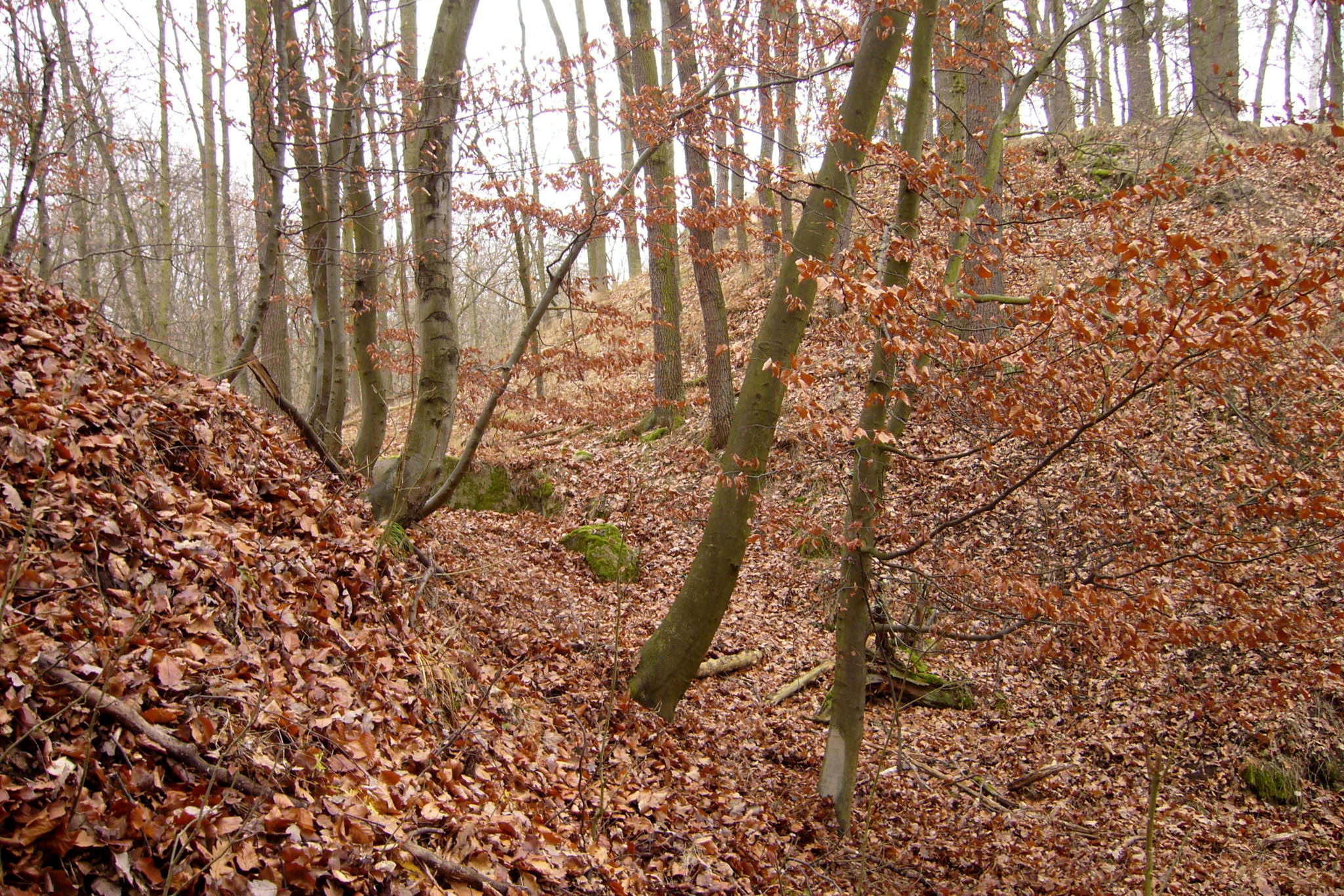 Šprymberk - třetí příkop